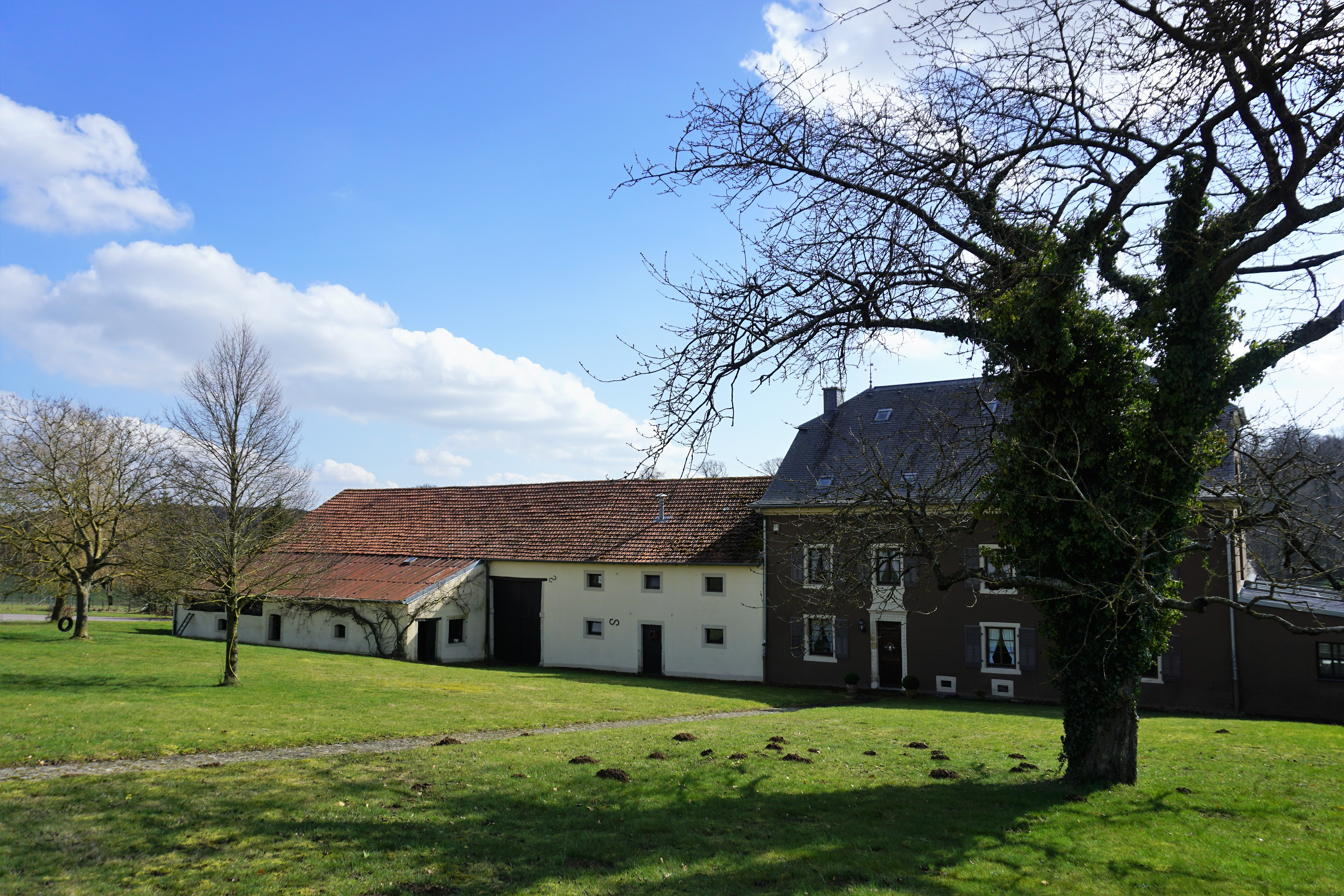 Lieu-dit Hakenhaff dans la commune de Lenningen.